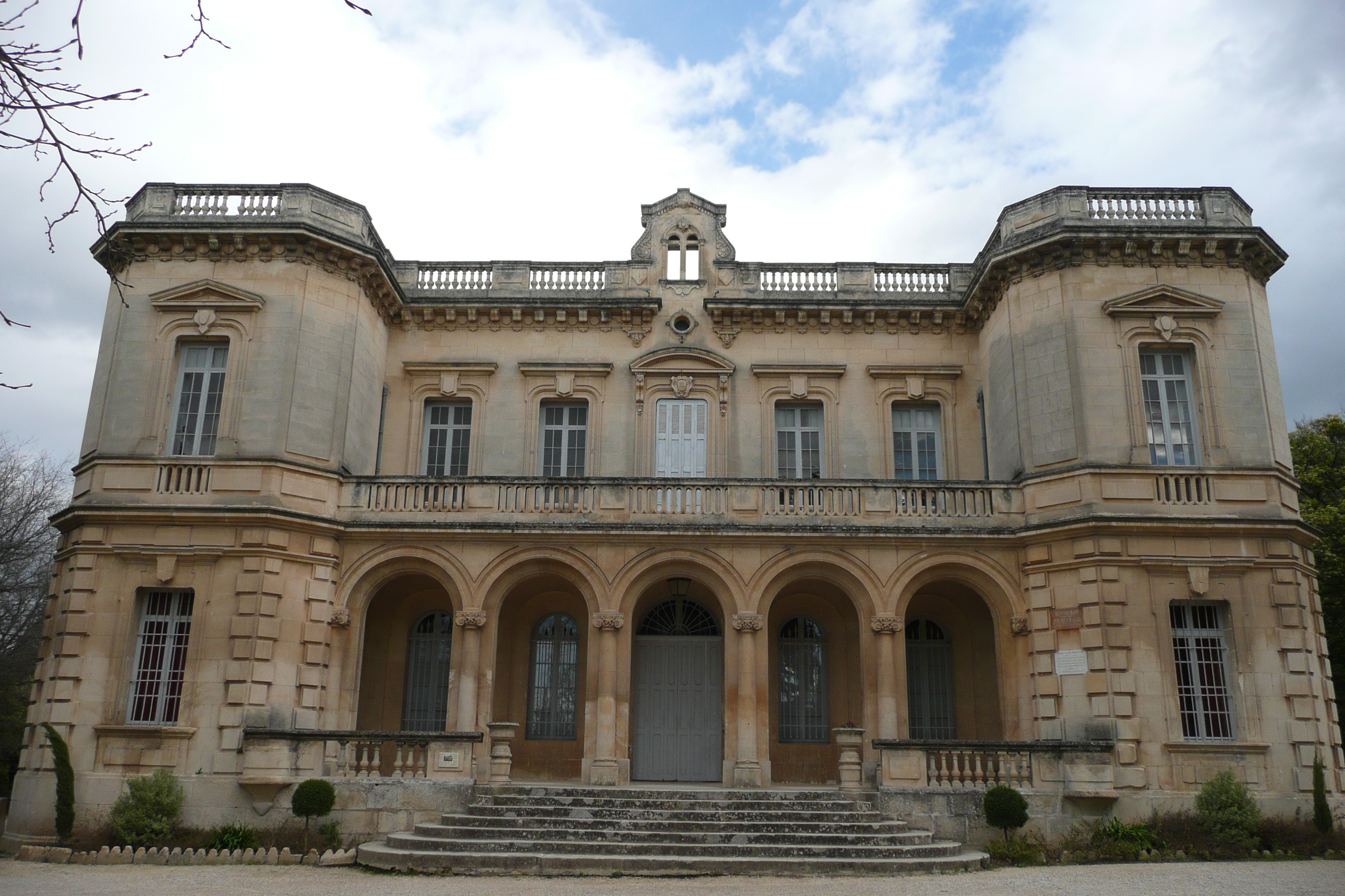 43°43′34.1″N 4°42′50.5″E / 43.726139°N 4.714028°E